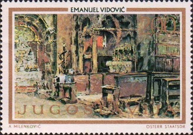 "Интерьер". Э. Видович